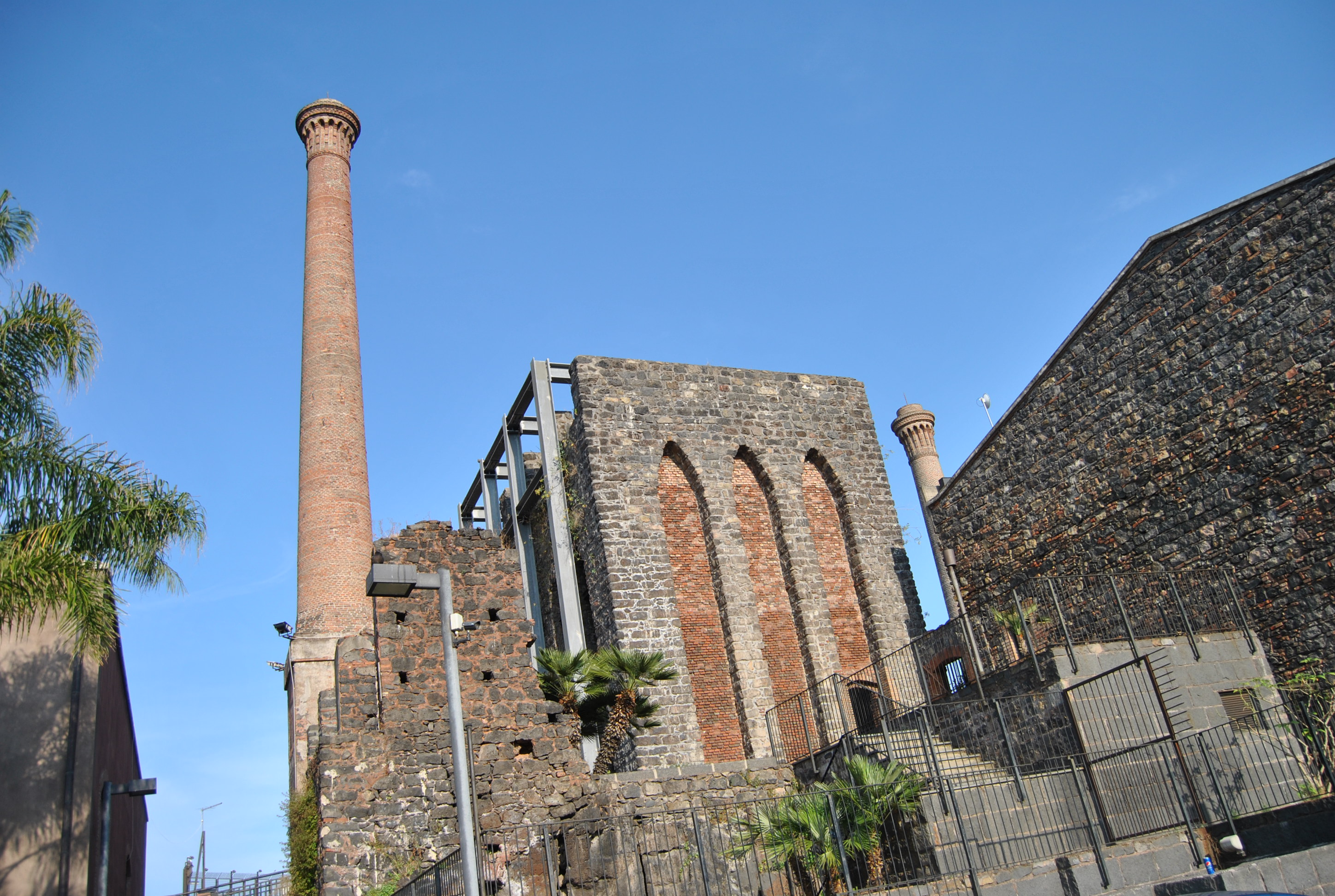 Complesso di raffinazione mineraria dello zolfo, oggi polo fieristico Le Ciminiere. Ciminiera.